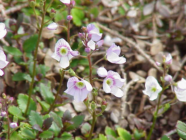 Species: 'Veronica catarractae (Parahebe catarractae) Family: Scrophulariaceae Image No. 1